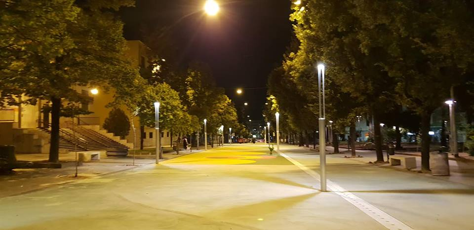 Veduta di Piazza Stefano Rodotà a Cosenza centro